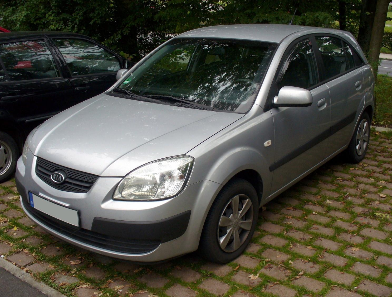 Kia Rio DE